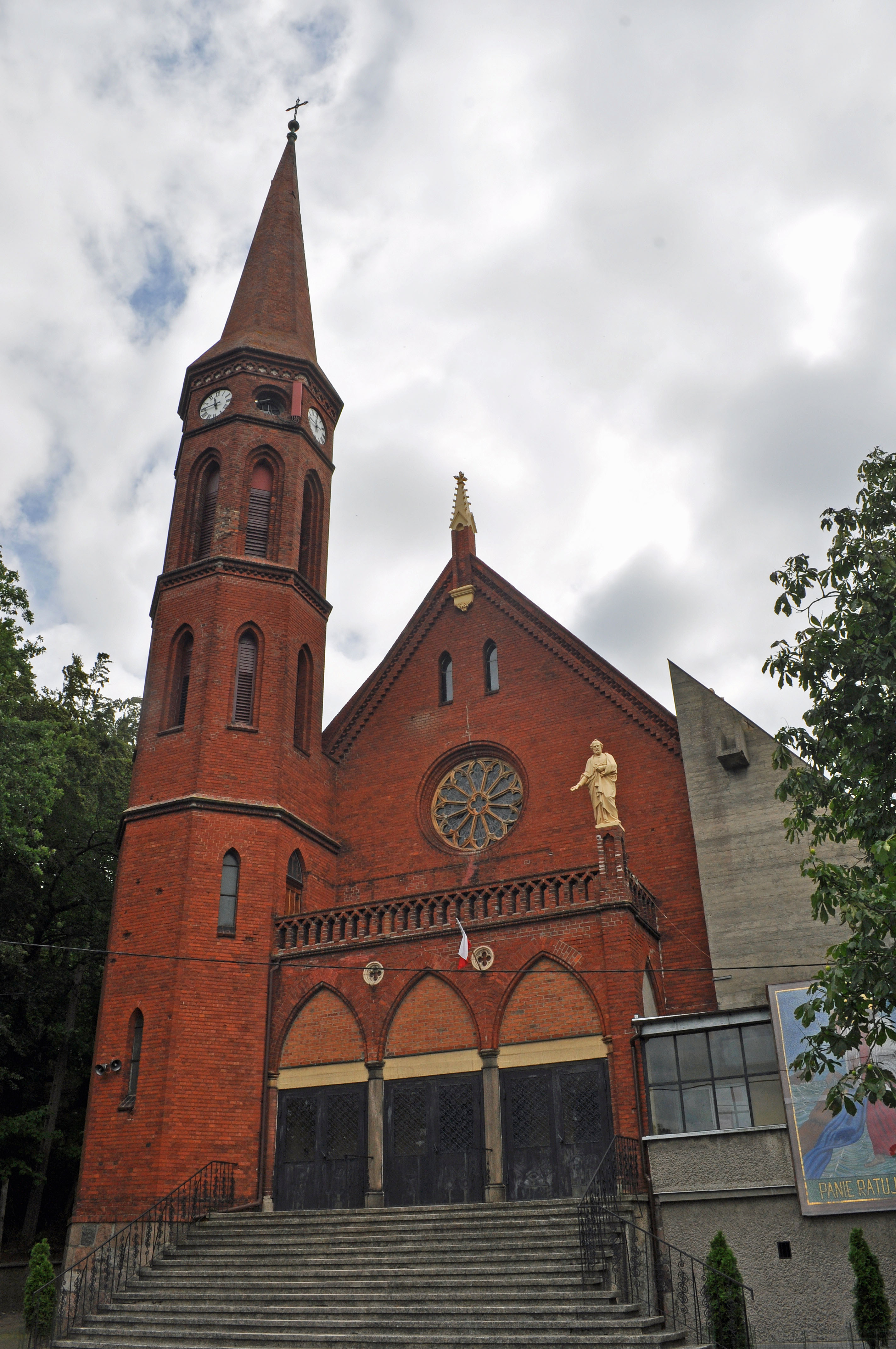 Aufgenommen in Polen im Juli 2011. Die Bilder tragen im Namen Ort und Objekt sowie das Aufnahmedatum.